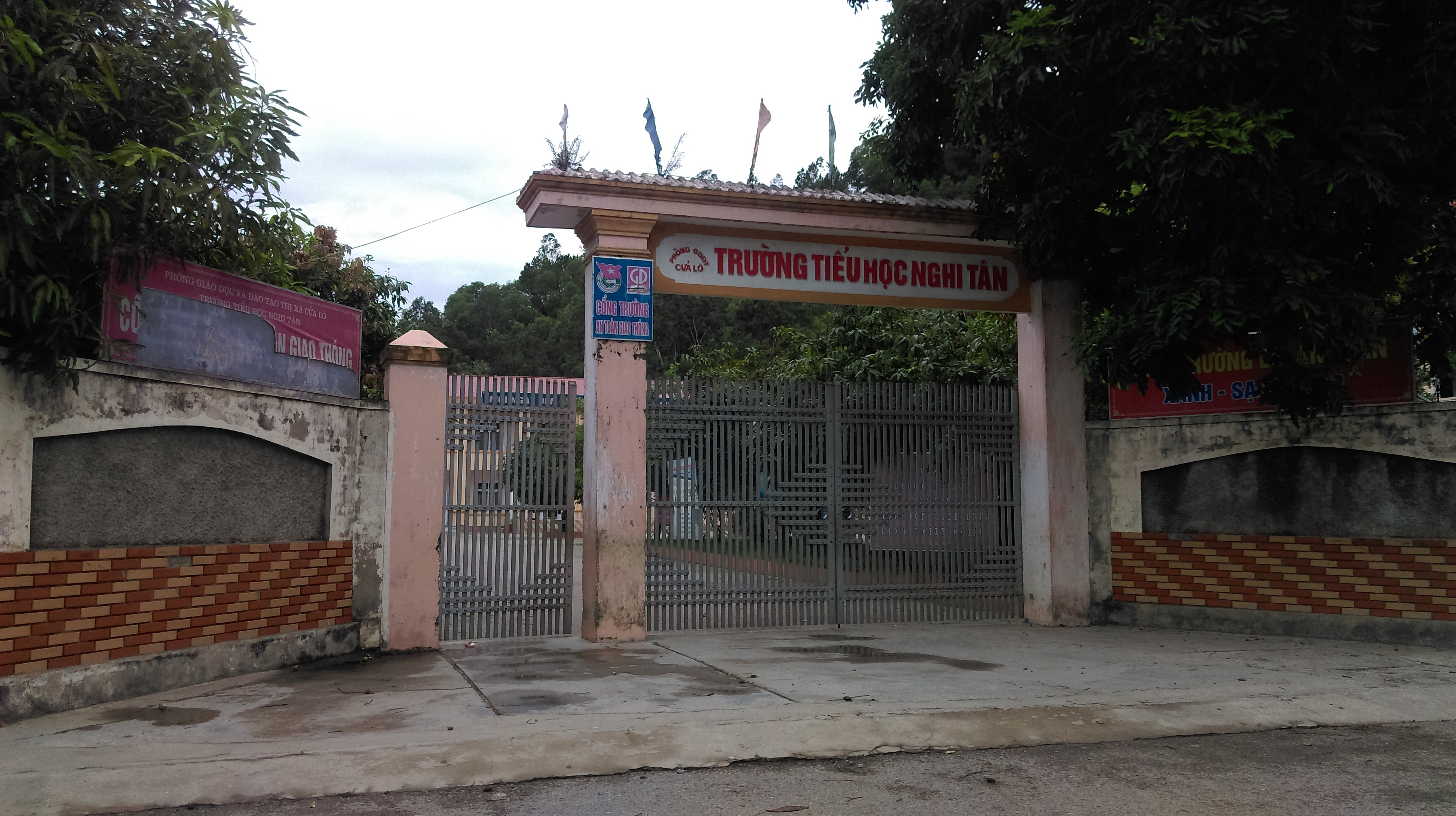 Trường Tiểu học Nghi Tân, Cửa Lò, Nghệ An